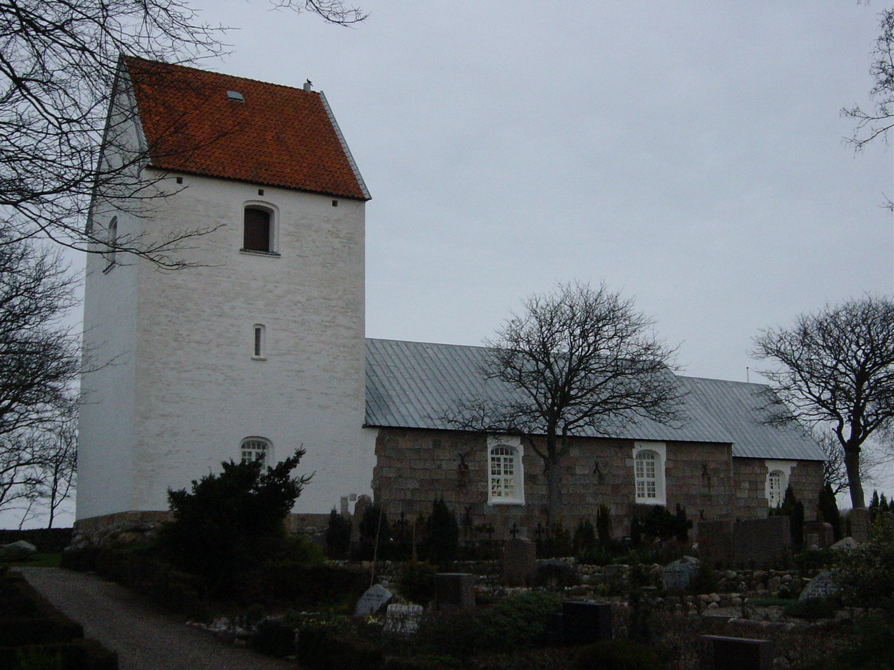 Horne Kirke, Hirtshals, Nordjylland, Danmark